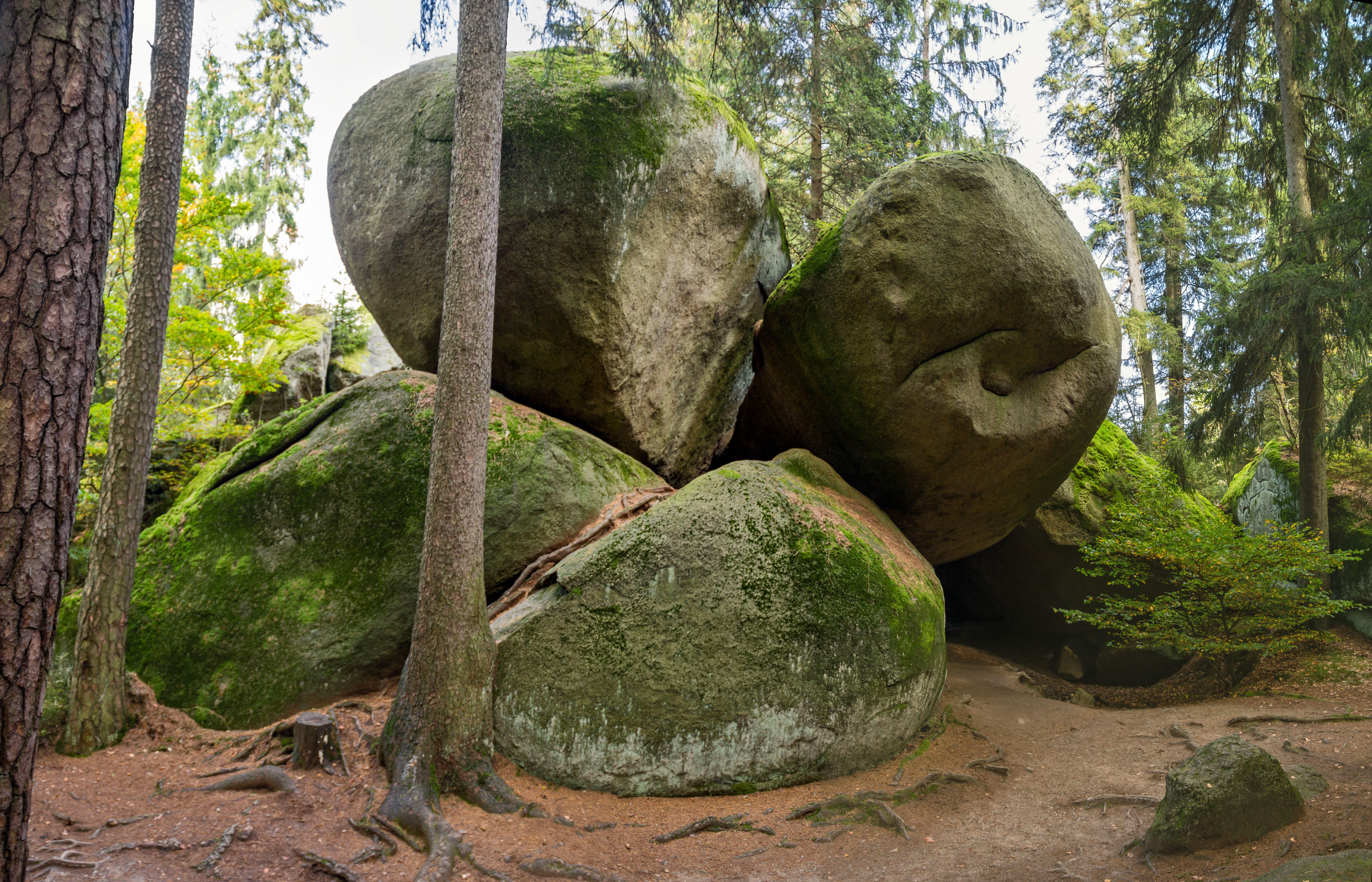 Luisenburg, Naturschutzgebiet, Geotop